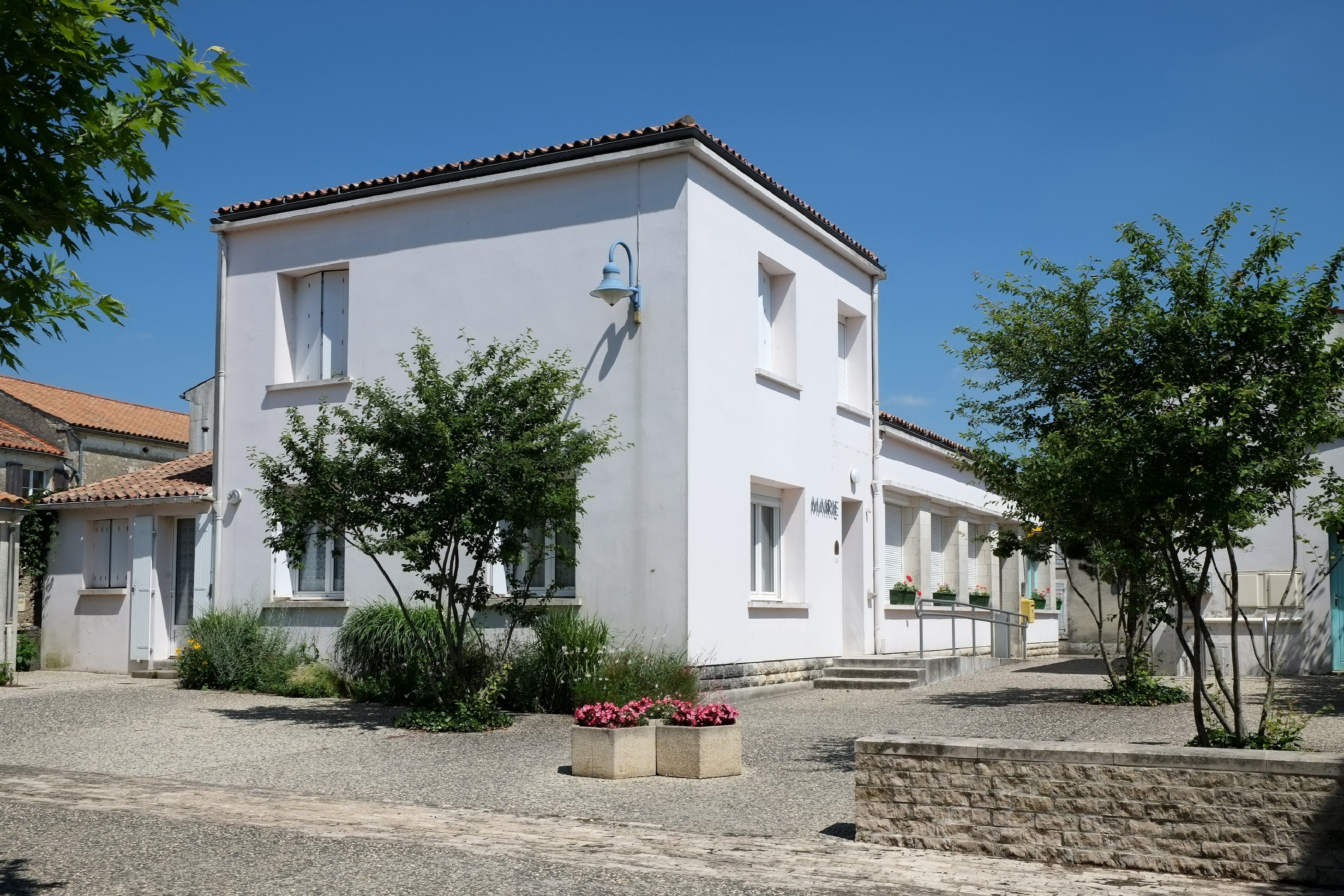 Mairie de Taugon Charente-Maritime France